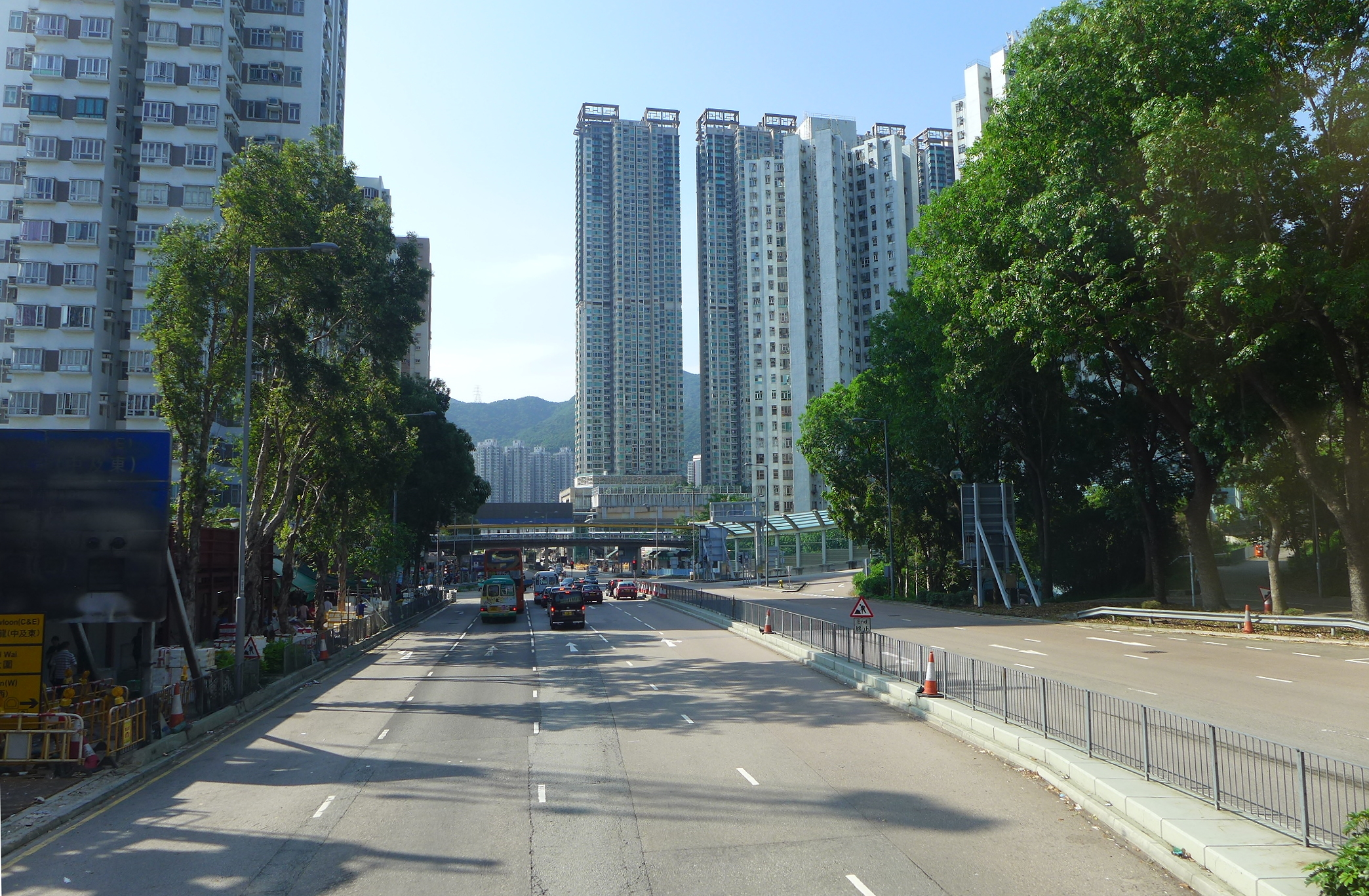 Mei Tin Road